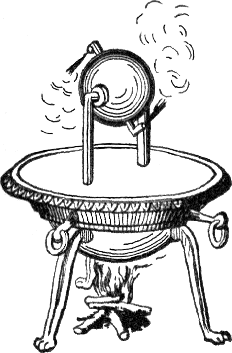 Heronin aeolipiili